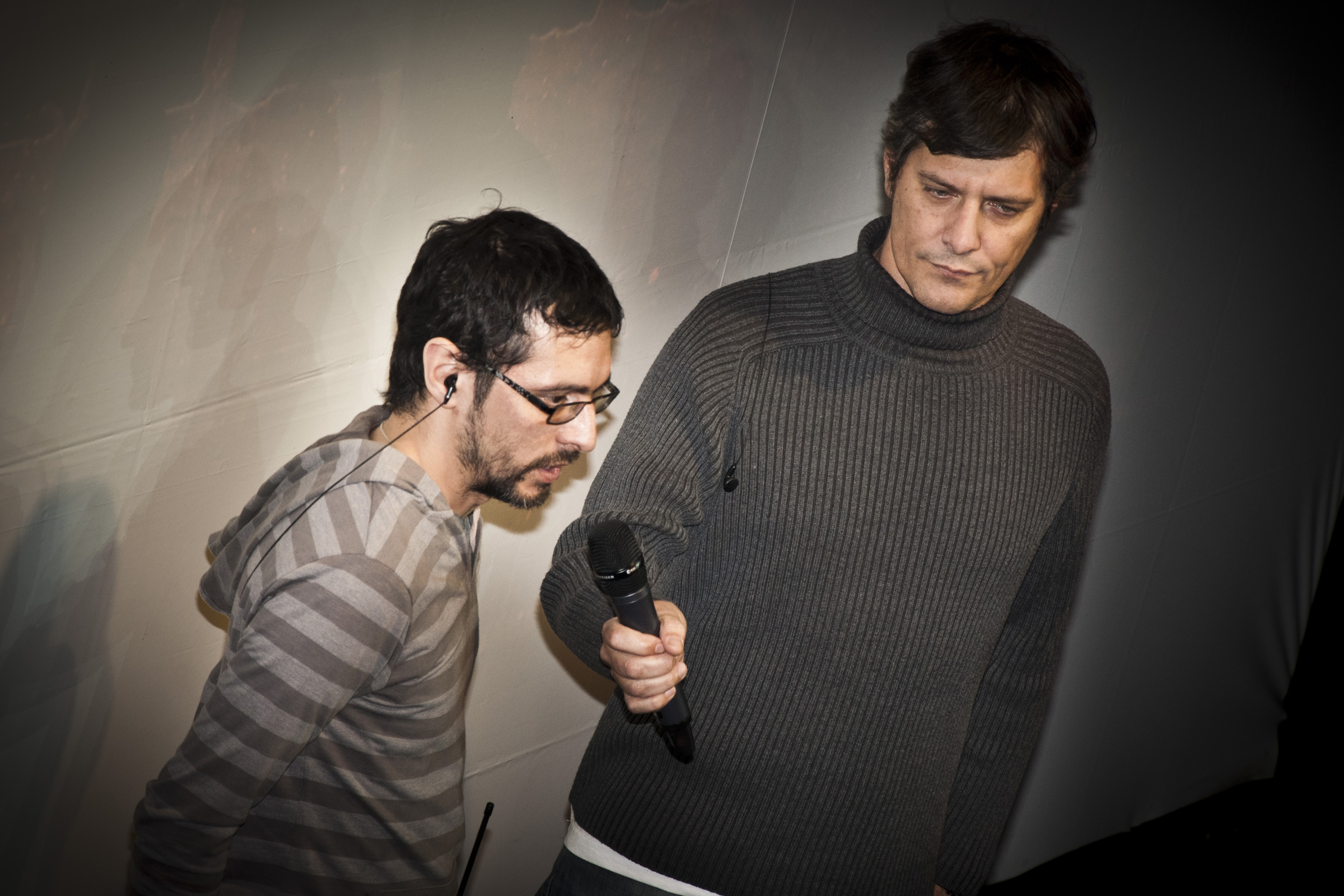 Presentación del video documental Piedra que late, sobre la Misa India celebrada en Tandil el 3 de diciembre de 2011. La presentación se realizó en el Teatro Vorterix el 9 de julio de 2013.